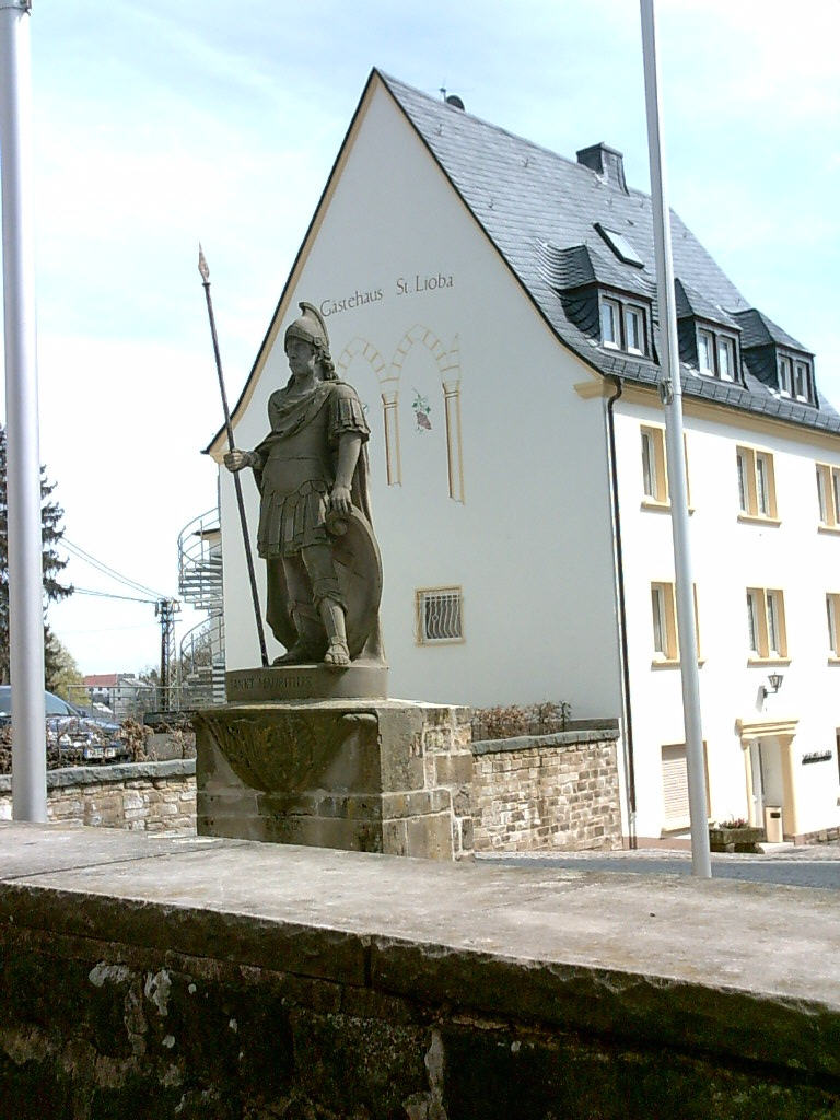 Statue des heiligen Mauritius vor dem Gästehaus Lioba der Benediktinerabtei Tholey, selbst fotografiert, 21.04.2006, --Xocolatl 23:28, 21 April 2006 (UTC)